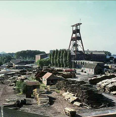 La Fosse n° 9 de la Compagnie des mines de l'Escarpelle était un charbonnage constitué d'un seul puits situé à Roost-Warendin, Nord, Nord-Pas-de-Calais, France.